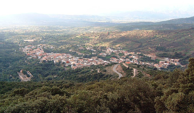 Il paese di Triei